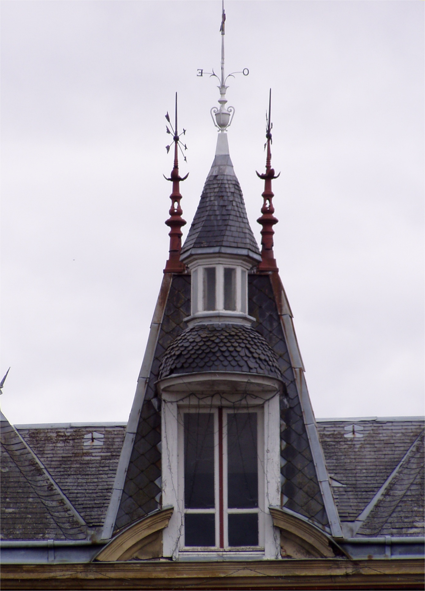 Photographie d'un clocheton tors sur une maison particulière, sise aux Grands-Chézeaux dans la Haute-Vienne, prise par Accrochoc, le 30 août fr:2006.